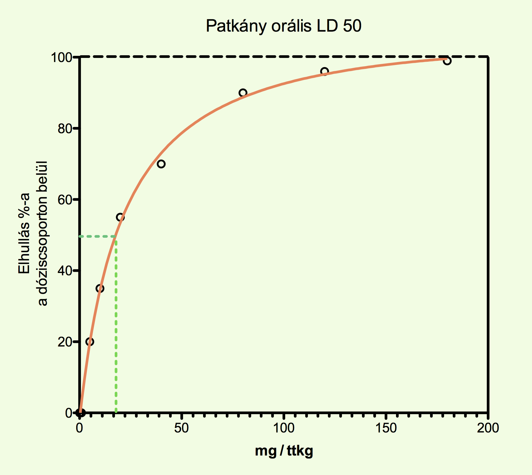 LD50 graph